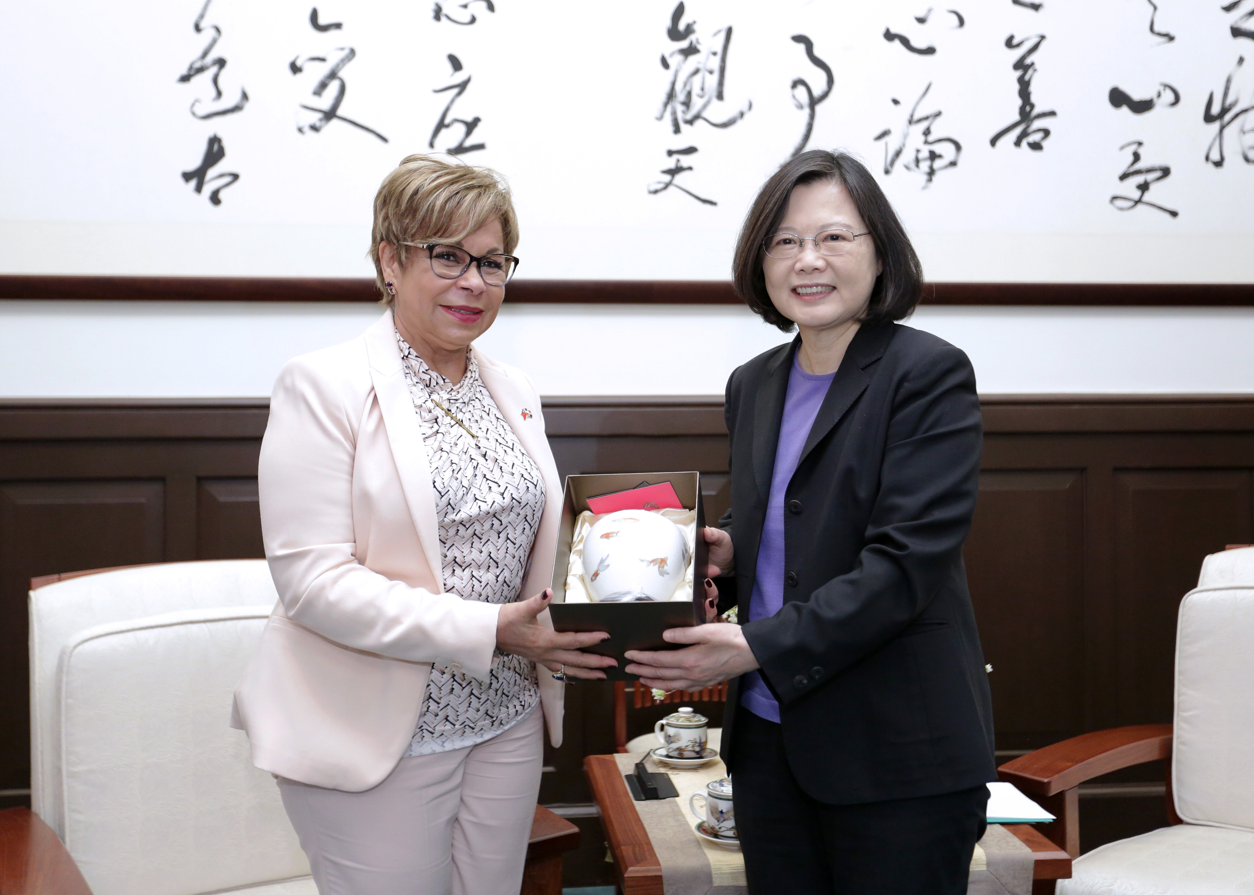 04.12 總統接見「多明尼加共和國駐臺大使阿布爾格格(Rafaela Alburquerque)」，於會後相互贈禮